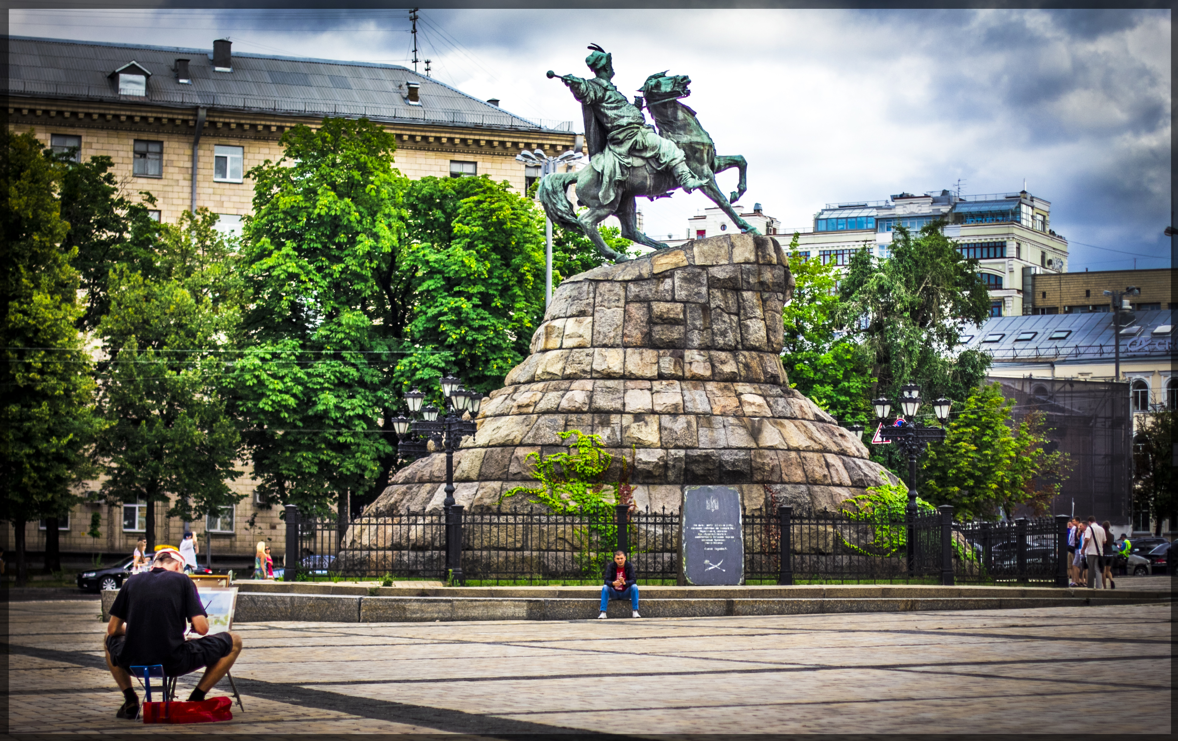 Памятник Богдану Хмельницкому